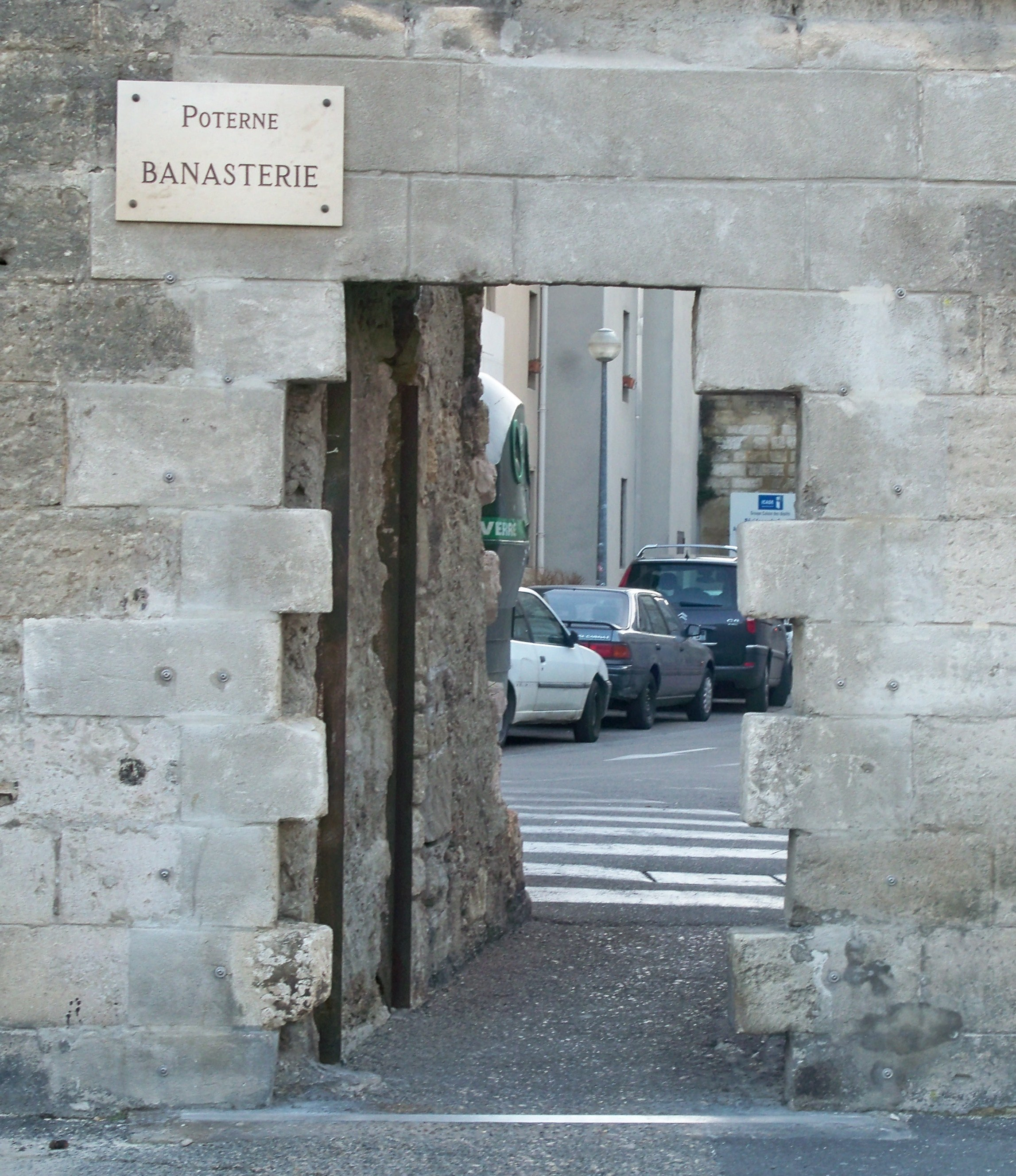 Poterne Banesterie, remprs d'Avignon, Vaucluse, France